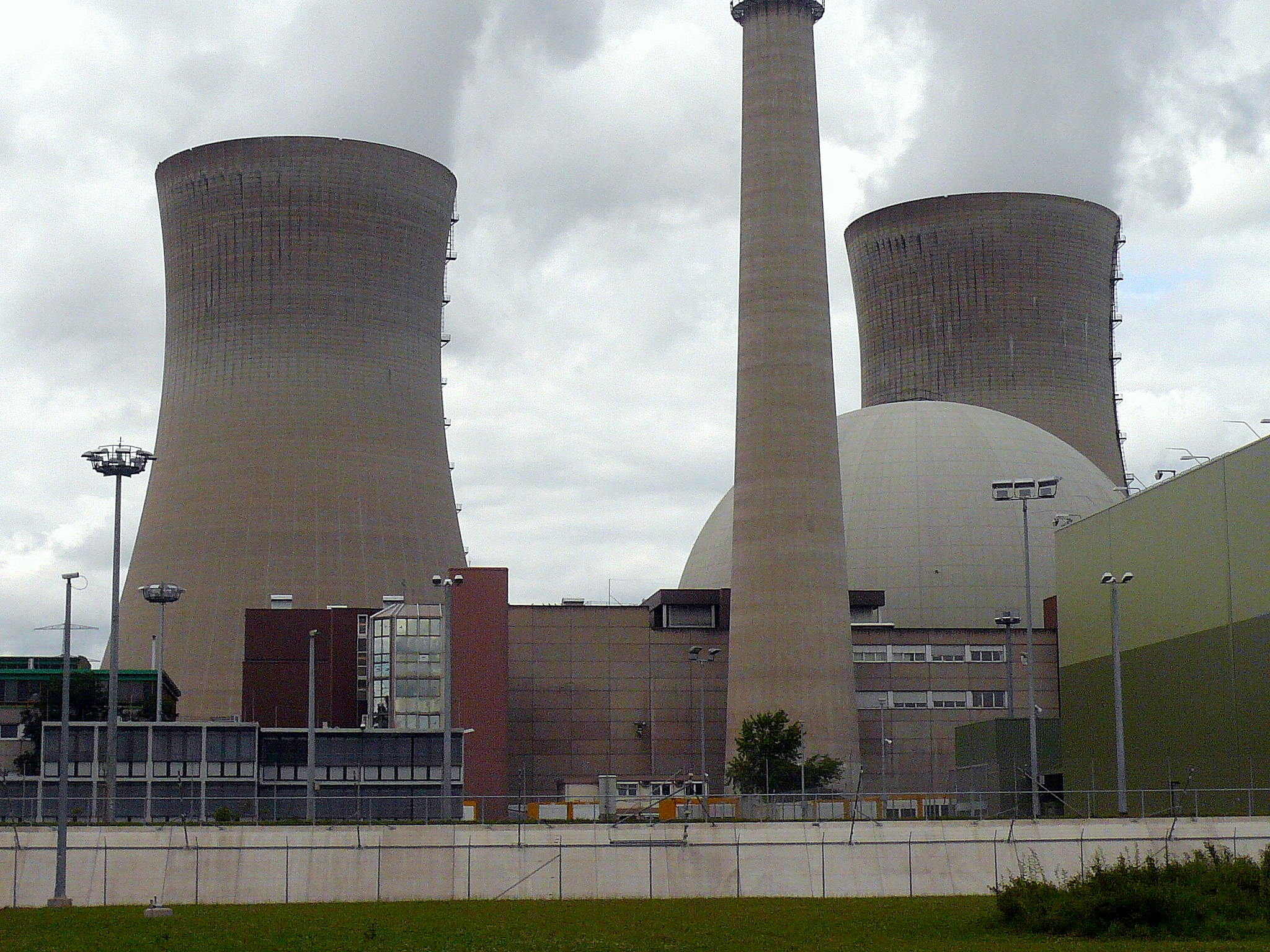 Kernkraftwerk Grafenrheinfeld